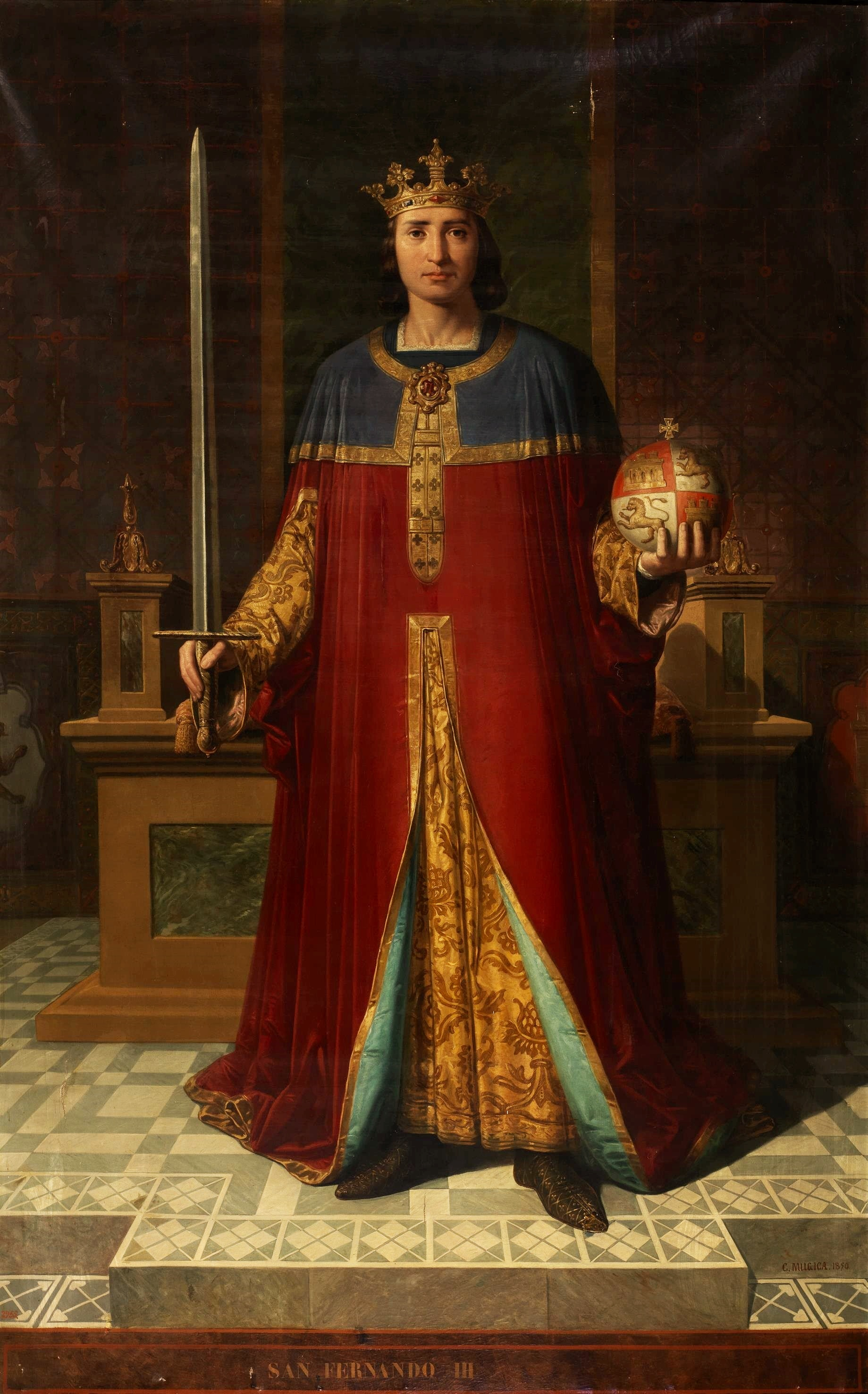 Retrato imaginario del rey Fernando III de Castilla, apodado "el Santo" († 1252). Fue hijo del rey Alfonso IX de León y de la reina Berenguela I de Castilla. Durante su reinado se reunificaron definitivamente los reinos de León y Castilla y fueron conquistadas a los musulmanes las ciudades de Jaén, Córdoba, Sevilla y Murcia, entre otras. Falleció en 1252 y fue sucedido por su hijo, Alfonso X el Sabio. En 1671 fue canonizado por el Papa Clemente X y sus restos mortales, que se conservan incorruptos, se veneran en la catedral de Sevilla.